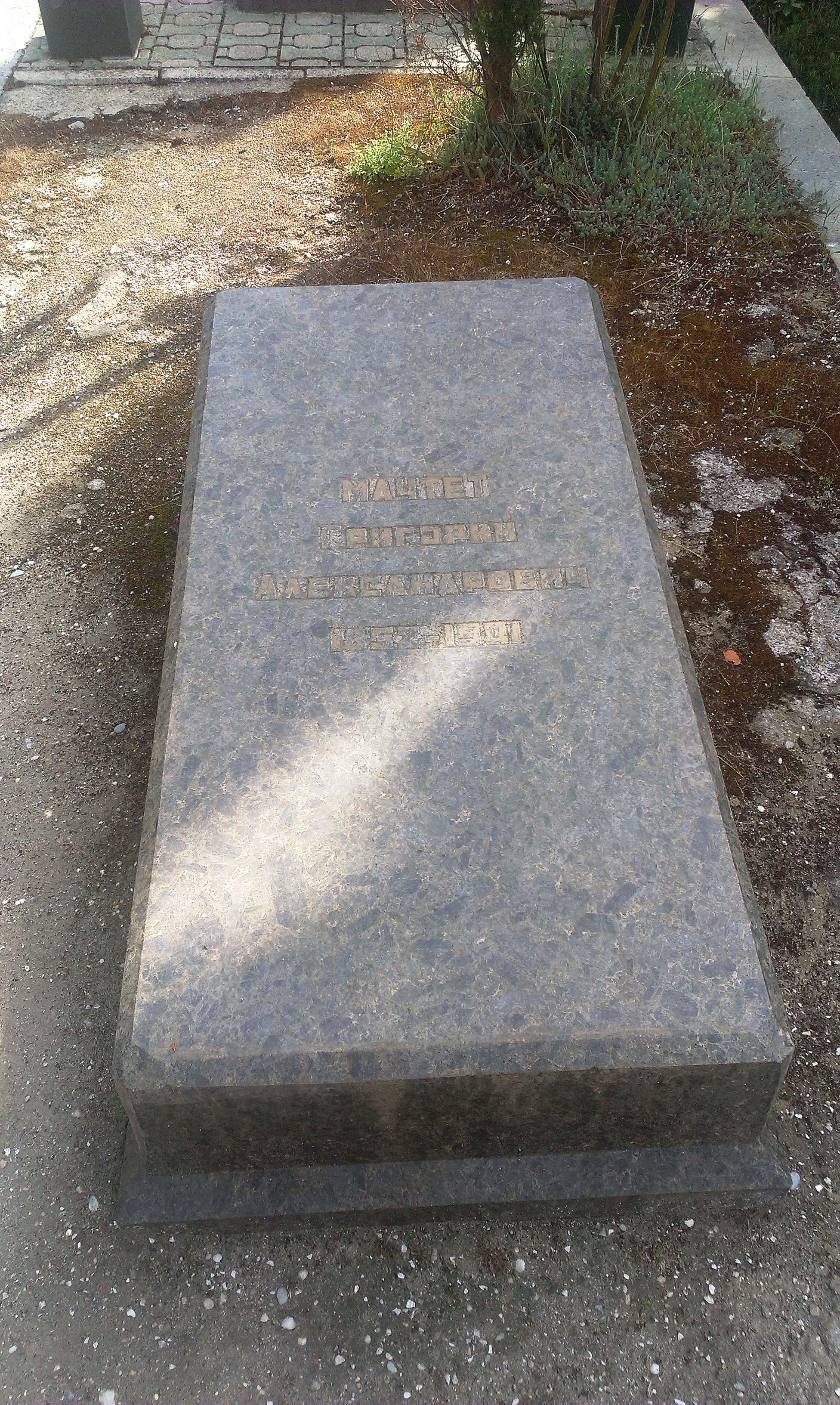 Поликуровский мемориал